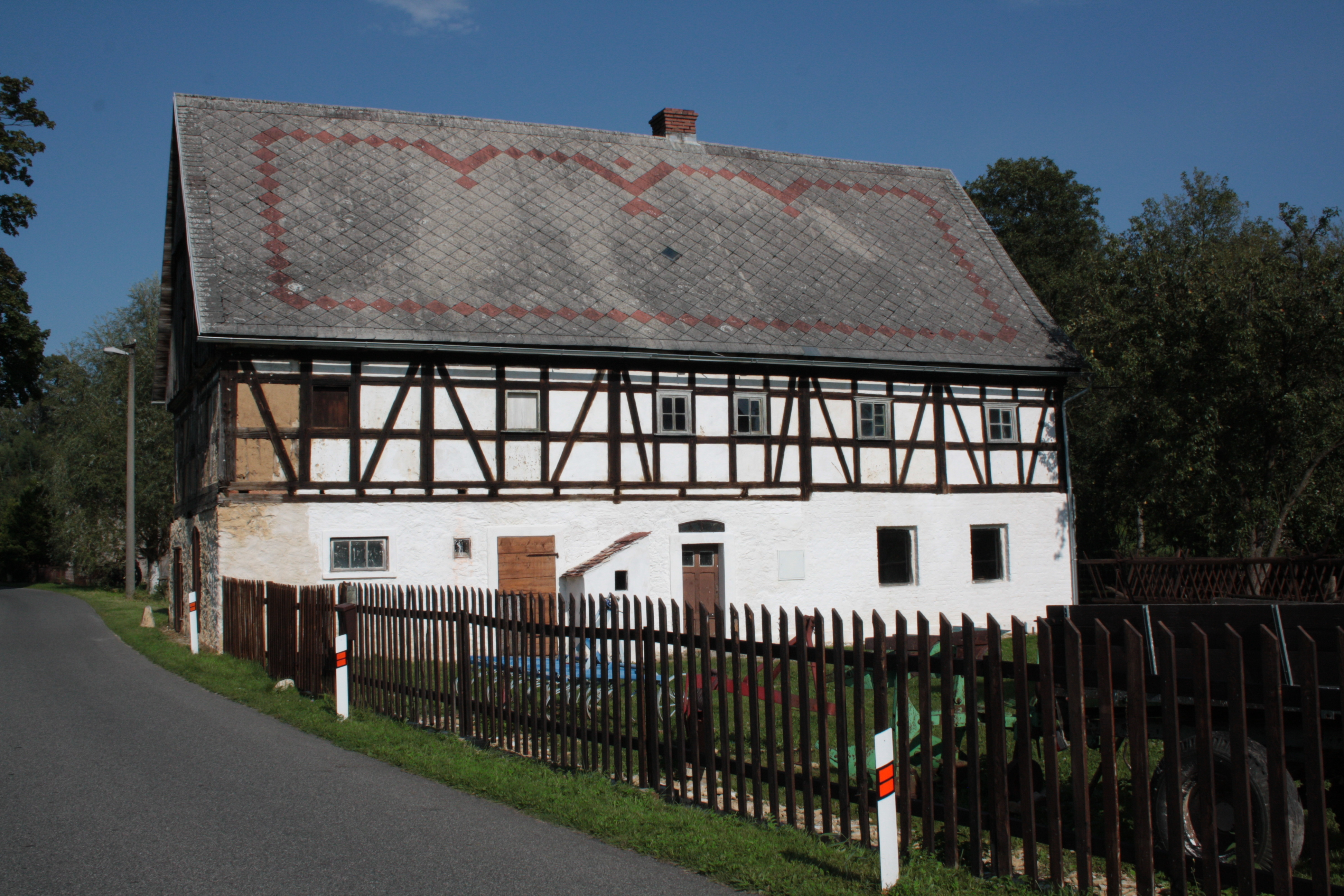 Dům číslo popisné 198 v Dolních Pertolticích (pohled od východu).